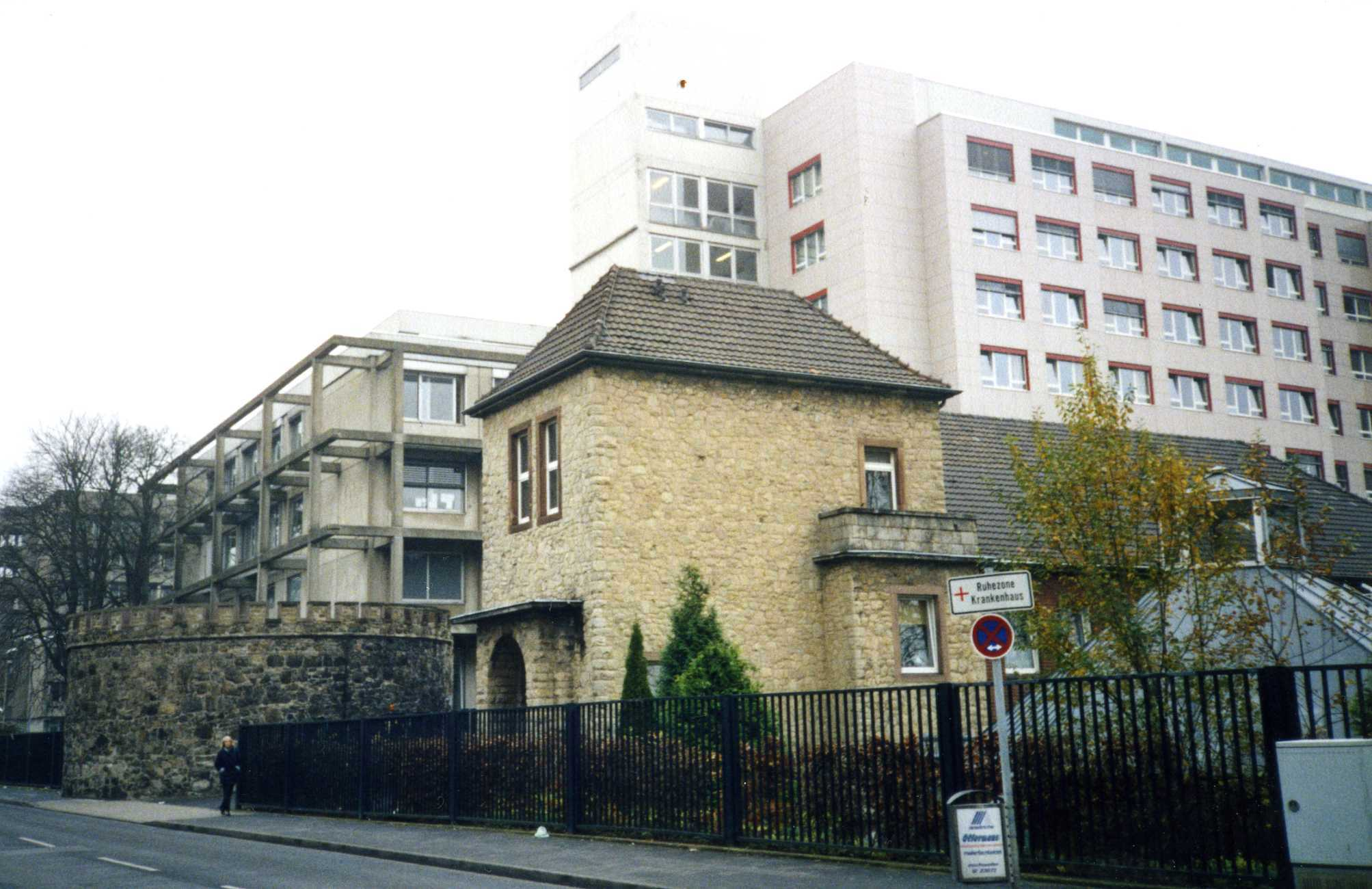 Ehemalige Isolierstation des St.-Antonius-Hospitals in Eschweiler, August 2005 abgerissen